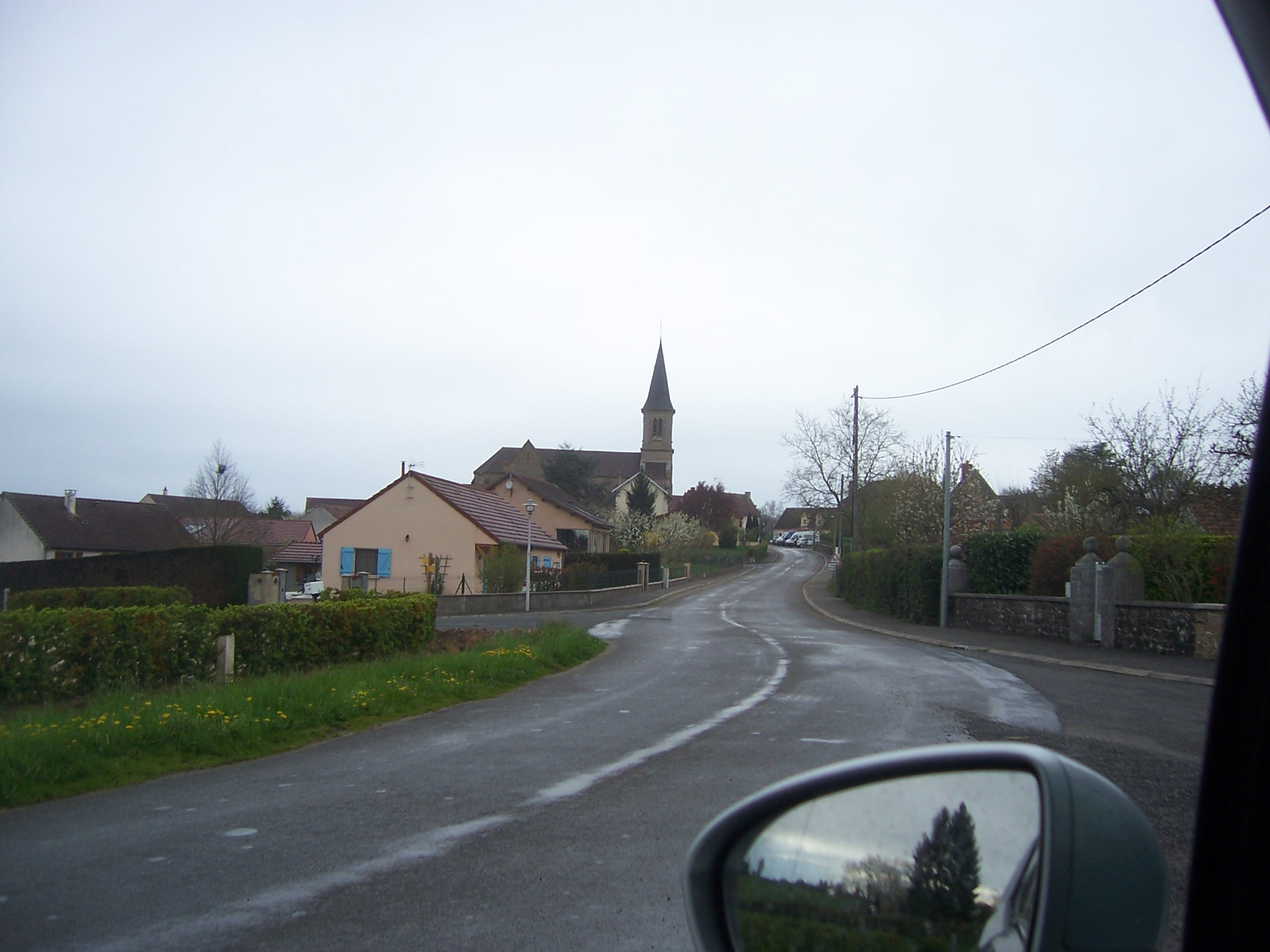 Marly-sur-Arroux